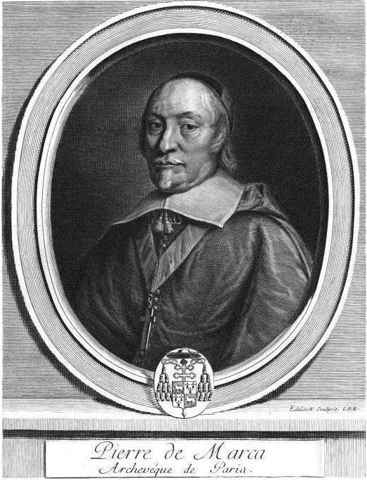 Portrait of Pierre de Marca, archevêque de Paris